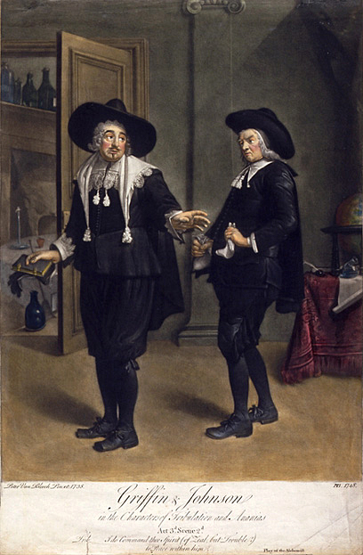 The Alchemist. Benjamin Griffin und Benjamin Johnson als Tribulation and Ananias im 3. Akt, 2. Szene von The Alchemist von Ben Jonson